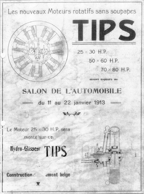 Ernest Oscar Tips Motore 1913